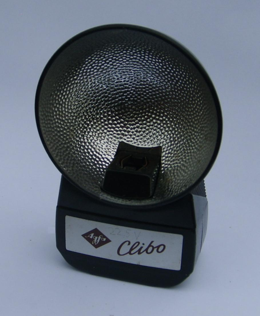 picture of flashlight approx. 1960